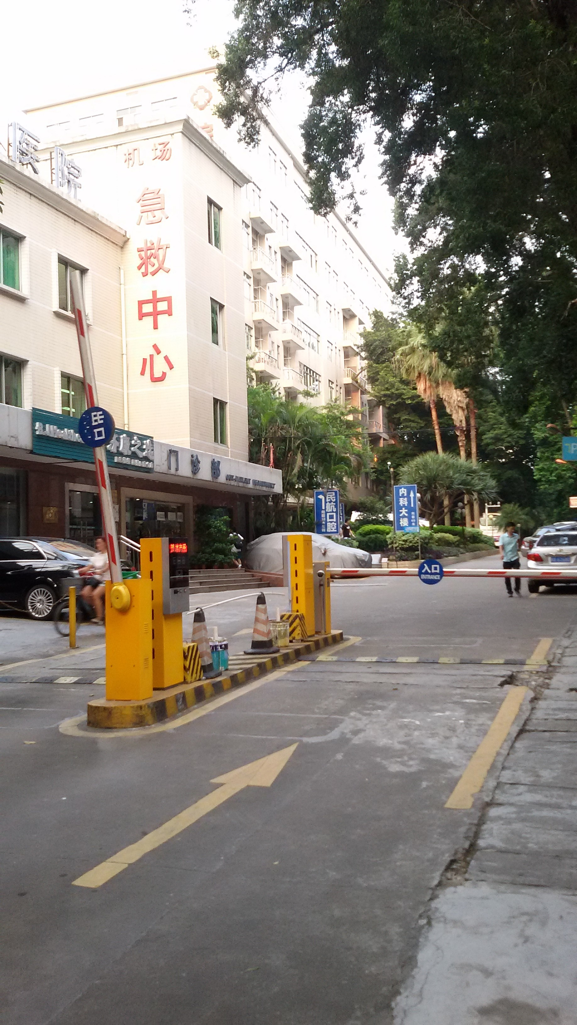 粵語: 民航廣州醫院